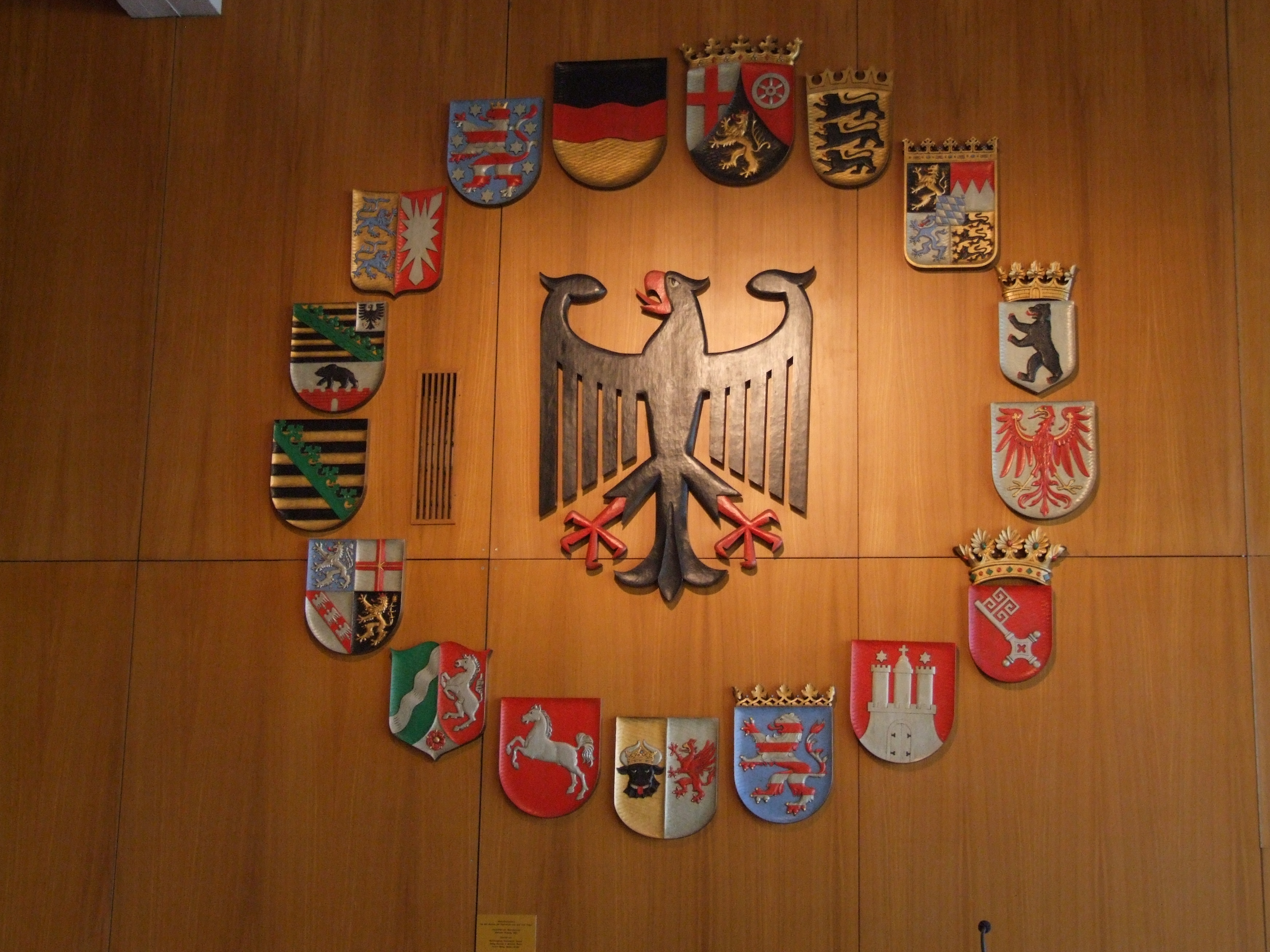 Universität Speyer, Freiherr-vom-Stein-Str. 2: Aula der Universität Speyer. Wappenwand auf der Westseite, oben links: Wappen der Universität, oben rechts Landeswappen des Sitzlandes Rheinland-Pfalz, in der Mitte der Bundesadler für den Träger Bund und im Kreis je nach Genehmigung das kleine oder große Wappen der 15 weiteren Trägerländer